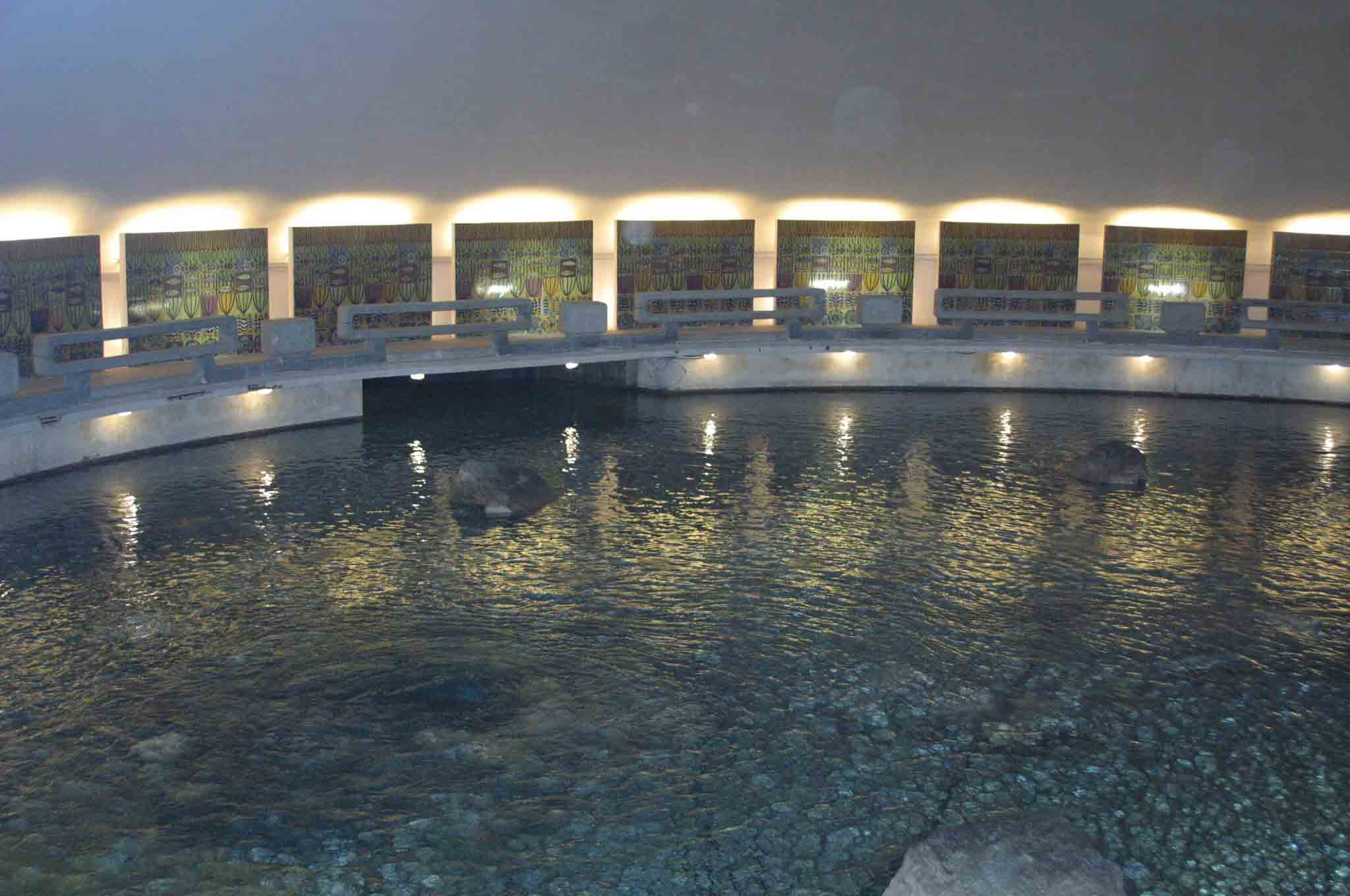 Sorgente Pollentina di Proprietà dell'acquedotto pugliese in Cassano Irpino (AV). comunecassanoirpino.it